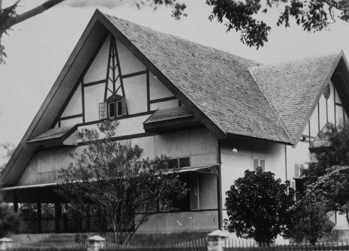 Foto. Controleurswoning Paloe